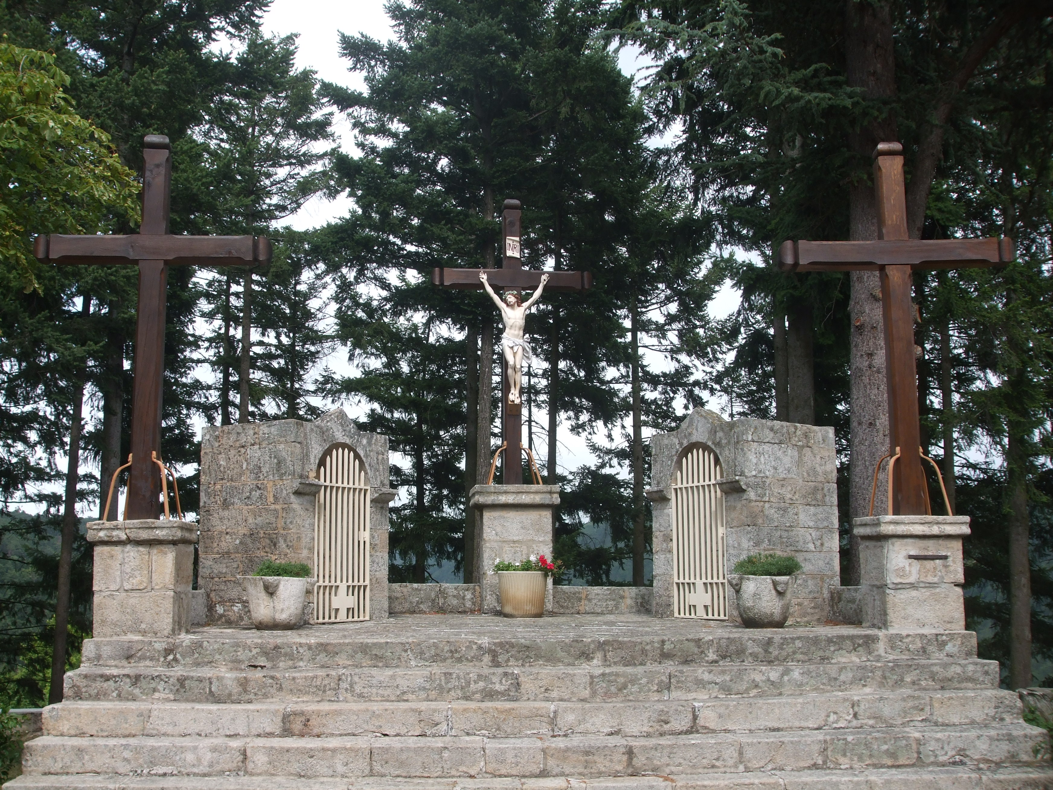 érigé par le bienheureux Pierre Vigne de 1712 à 1713